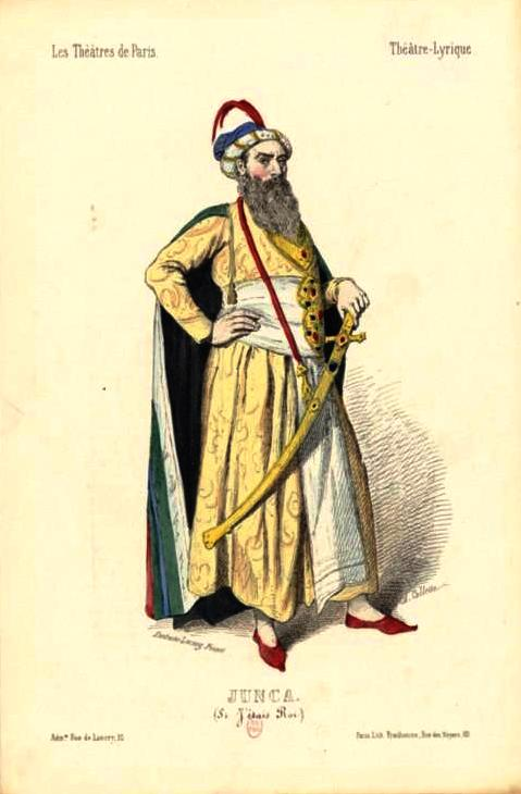 Marcel Junca (1818-1878)